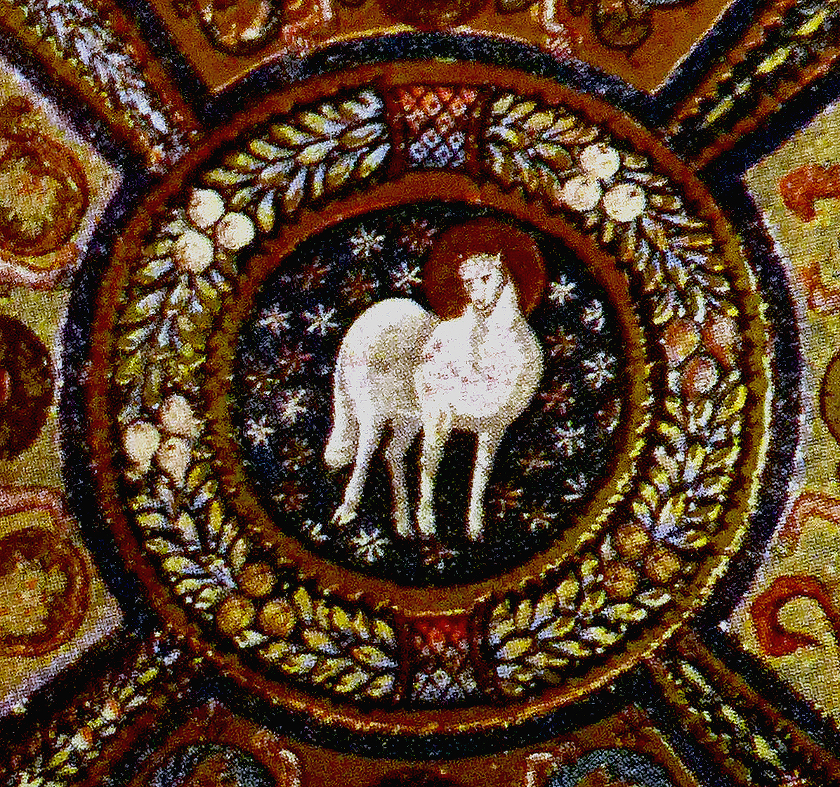 San Vitale-templom (Ravenna), Isten Báránya